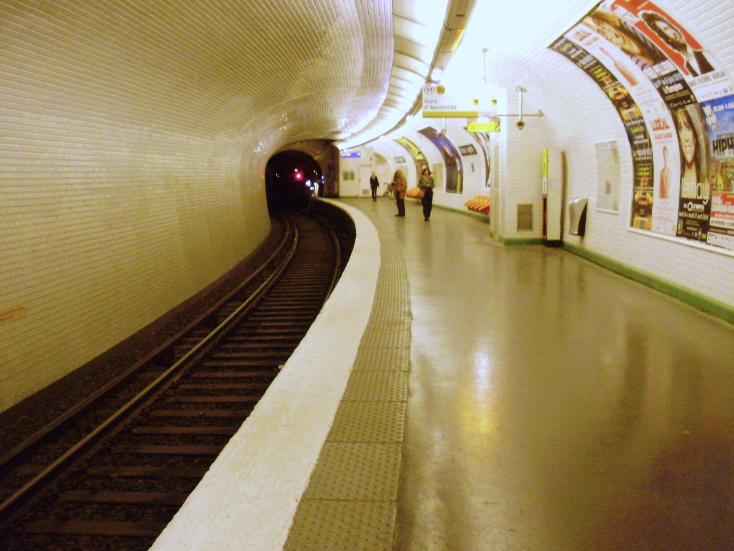 Quai de la station Chardon-Lagache du métro de Paris (vue depuis l'arrière du quai)